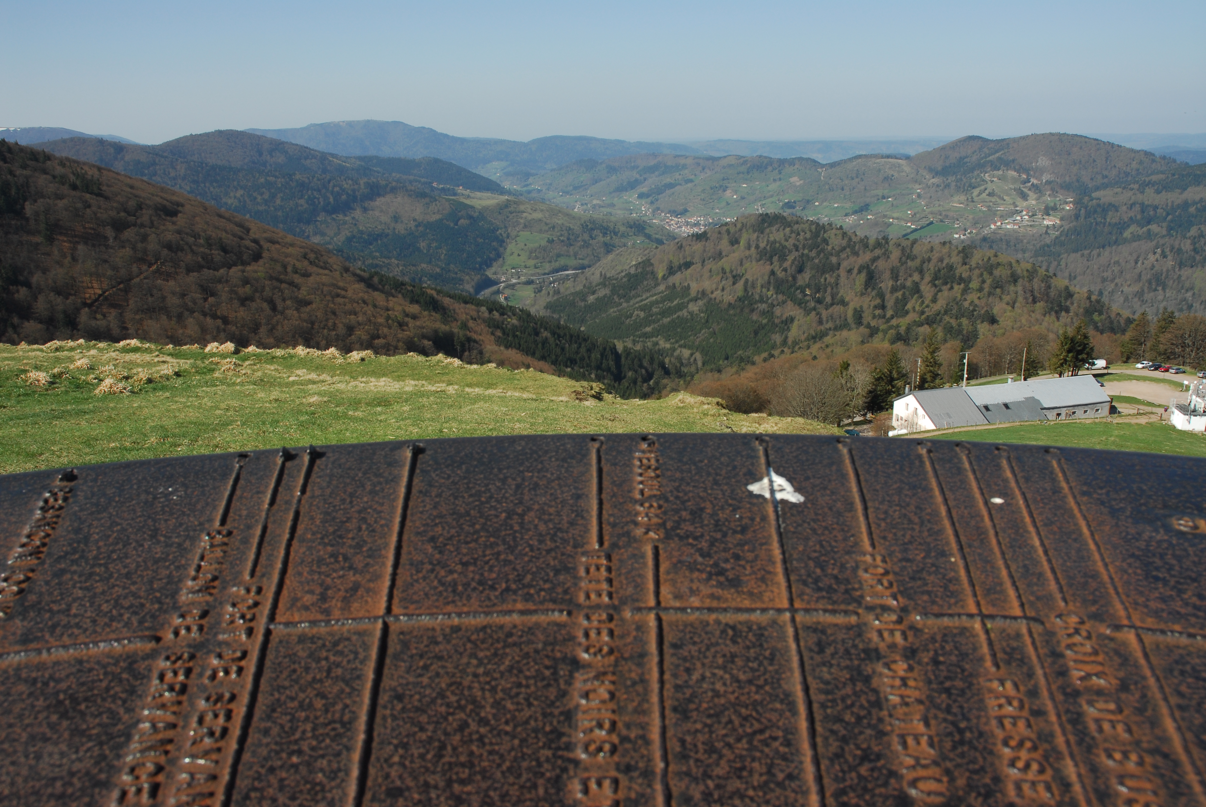 Sommet du Drumont, depuis la table d'orientation, Panorama en direction de la vallée de BUSSANG, localité située dans les Vosges